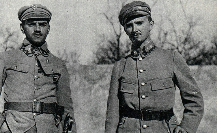 Ppor. Kazmierz Hoser oraz por. Stefan Dąb-Biernacki.